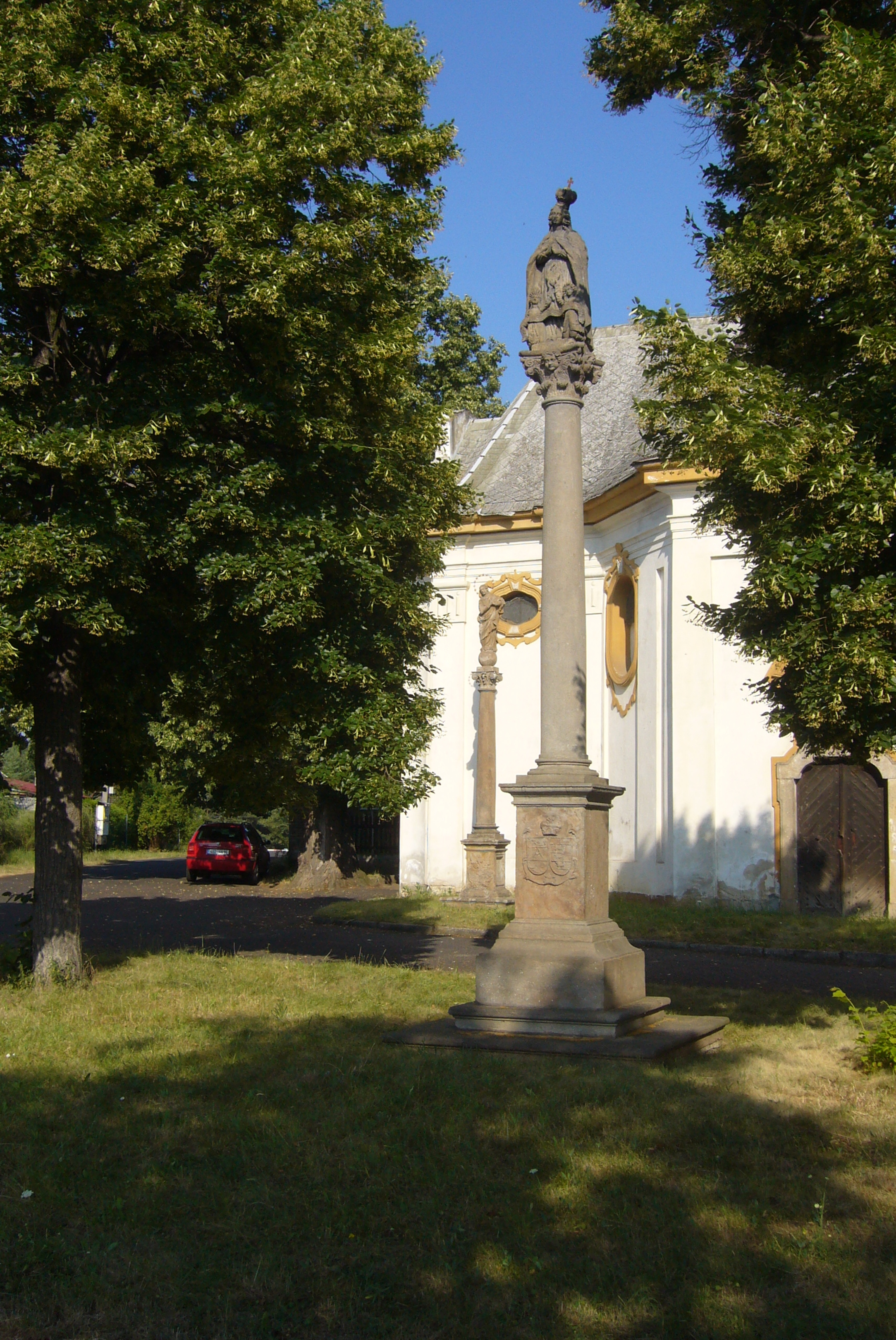 Sloup se sochou Panny Marie (Vikletice) přemístěný ze zaniklé vesnice Libouš